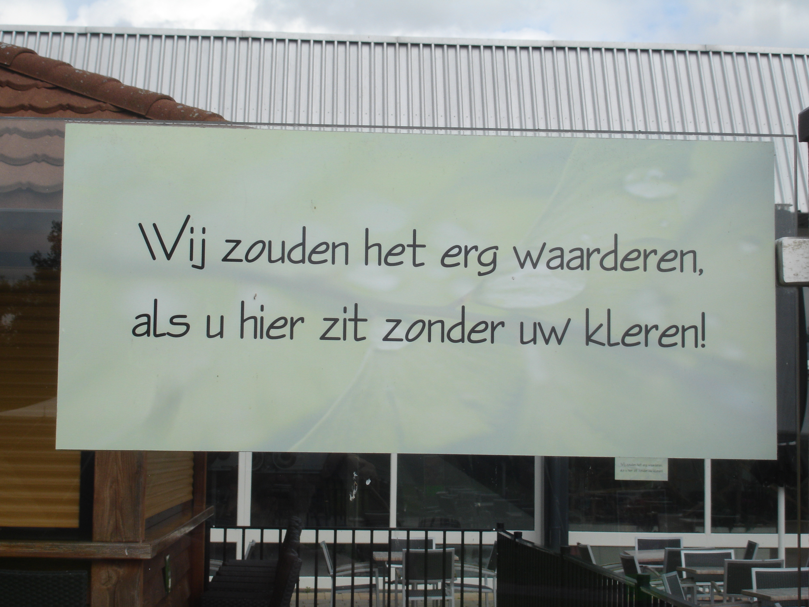 Bordje bij het terras van Flevonatuur